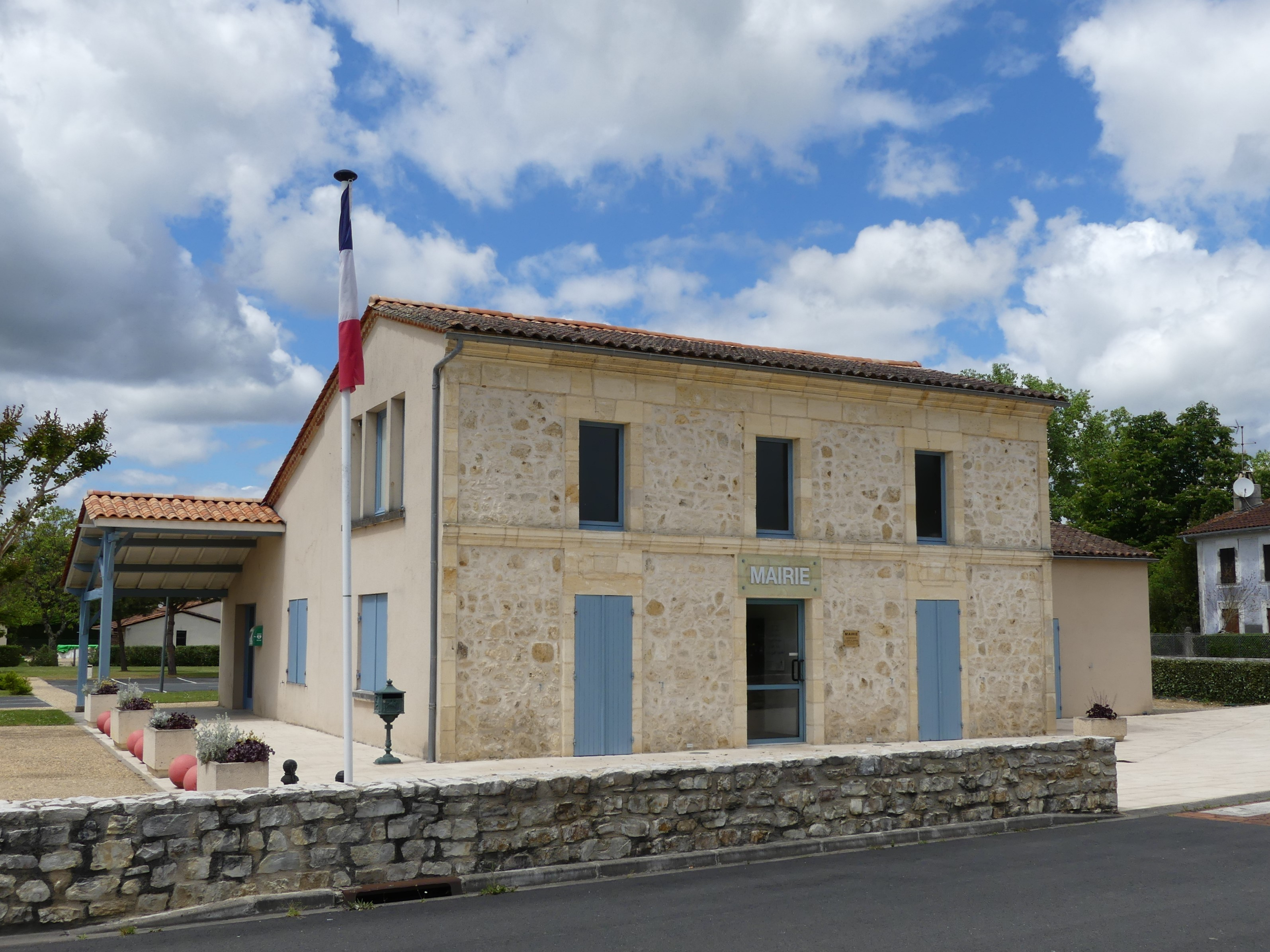 La mairie de Moulin-Neuf, Dordogne, France.